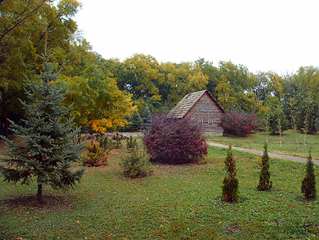 Memorial house in the village of Banatsko Veliko Selo, Vojvodina (Serbia)/Maison mémorial dans le village de Banatsko Veliko Selo en Voïvodine, Serbie